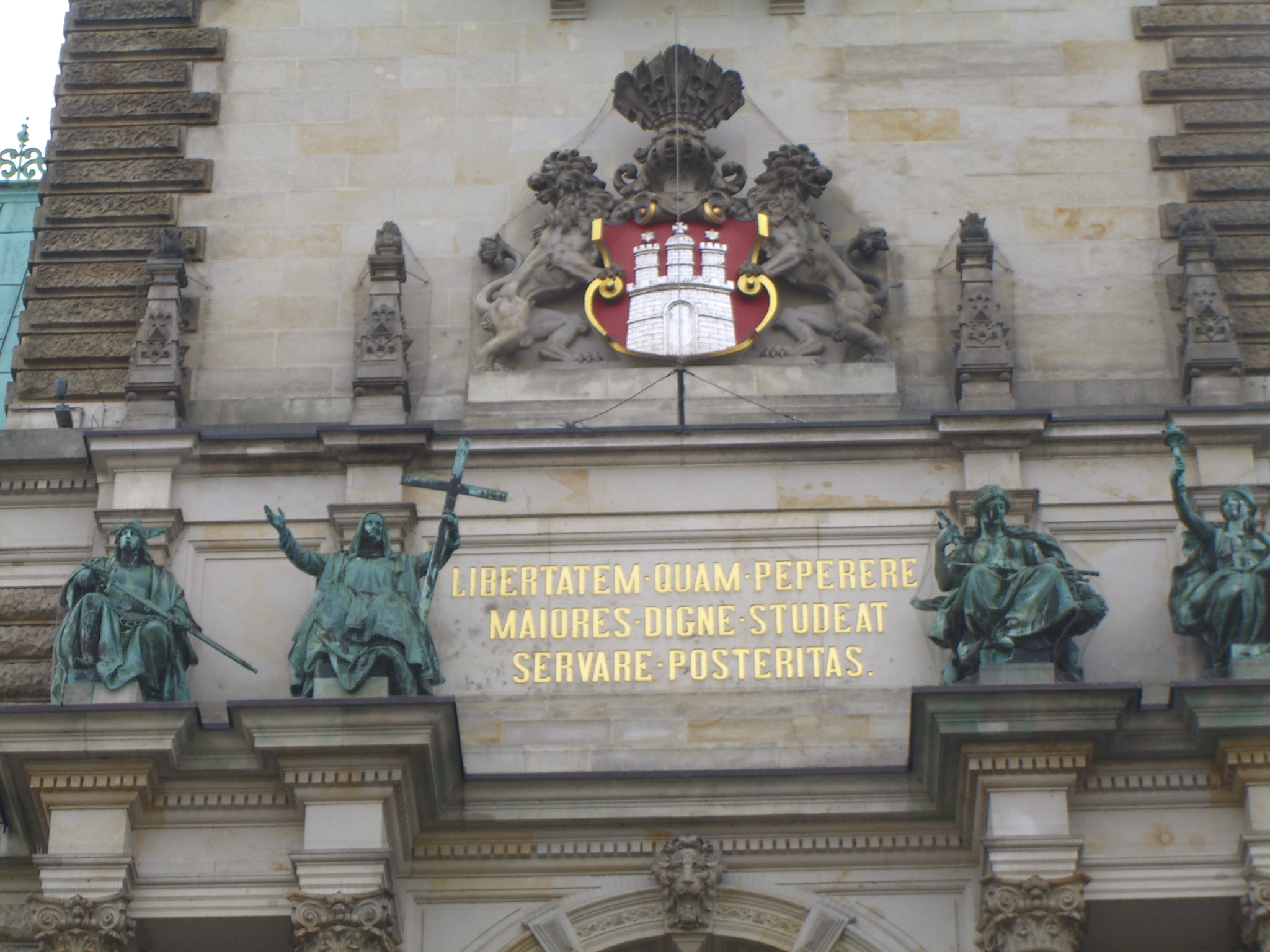 Motto della città di Amburgo sovrastante l'ingresso principale del Rathaus (municipio)